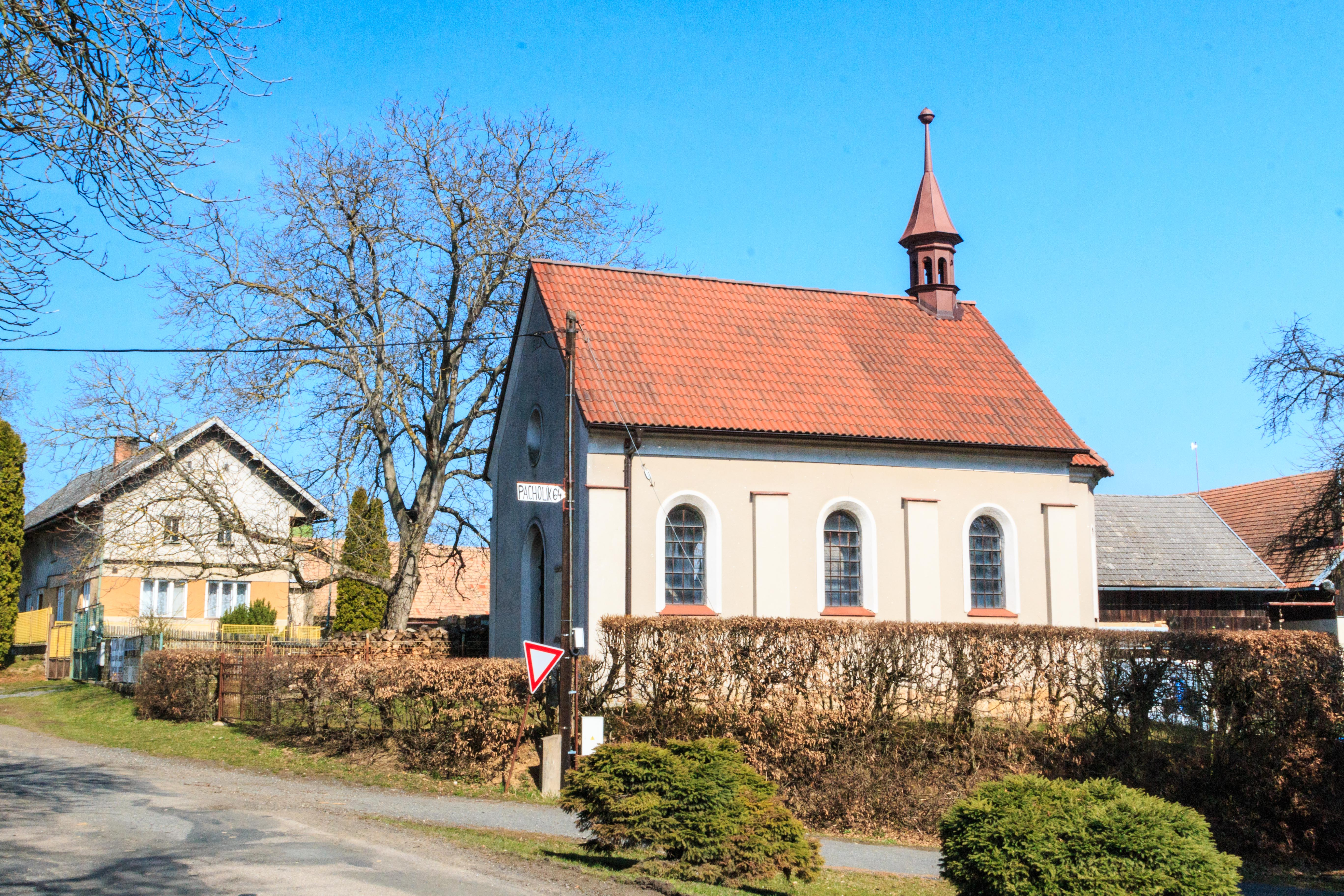 Zelenecká Lhota kaple